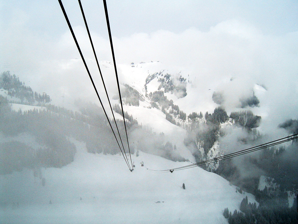 Blick aus einer Kabine der 3S-Bahn im Skigebiet Kitzbühel. Von der Wurzhöhe kommend mit Blickrichtung Pengelstein. Leider schlechte Wetterverhältnisse.